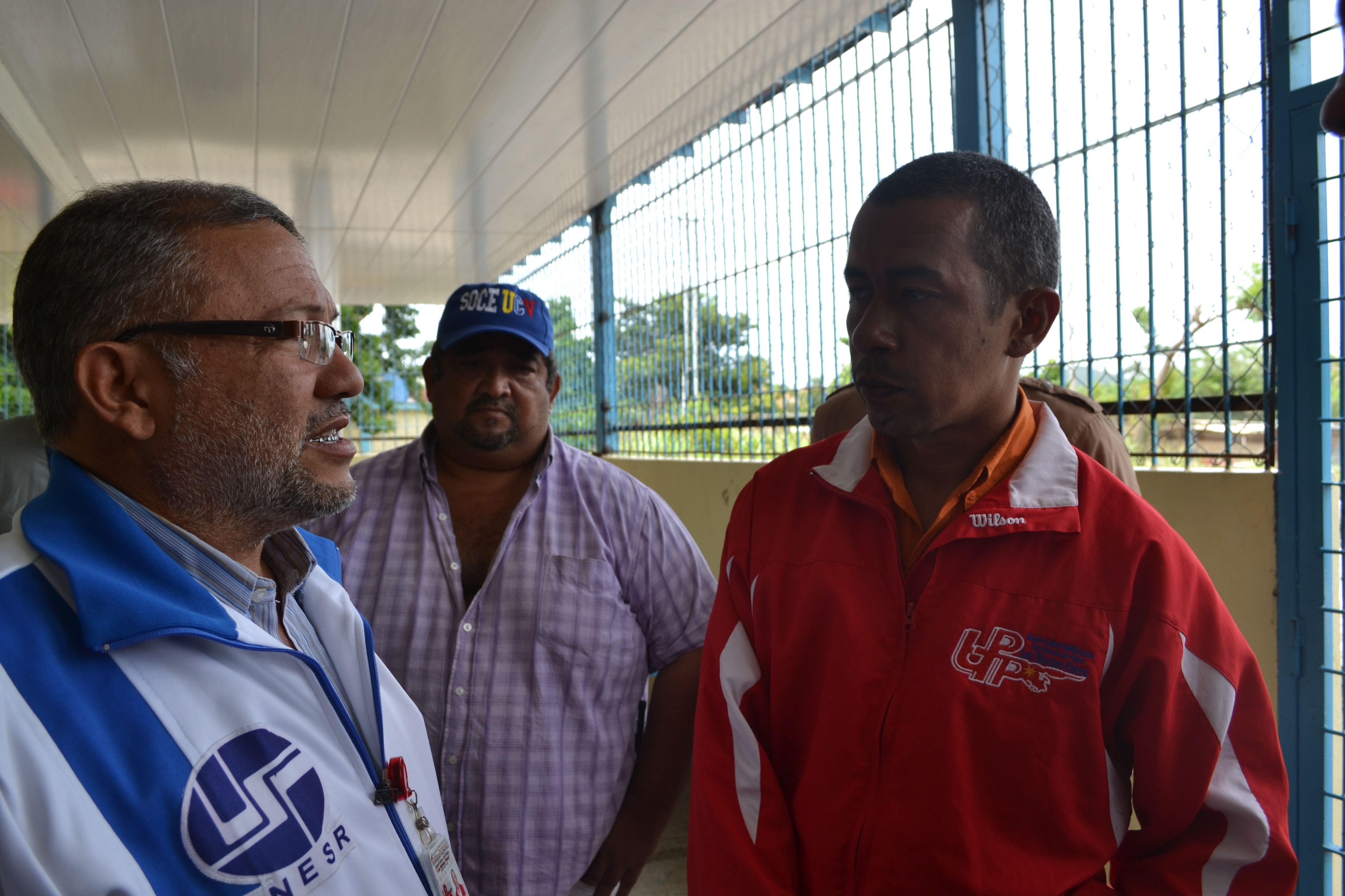 Rector Keli Rodríguez (Der) con el Vicerrector de Asuntos Estudiantiles Carlos Tineo (Izq) y el Jefe de Seguridad Johnny Martínez.